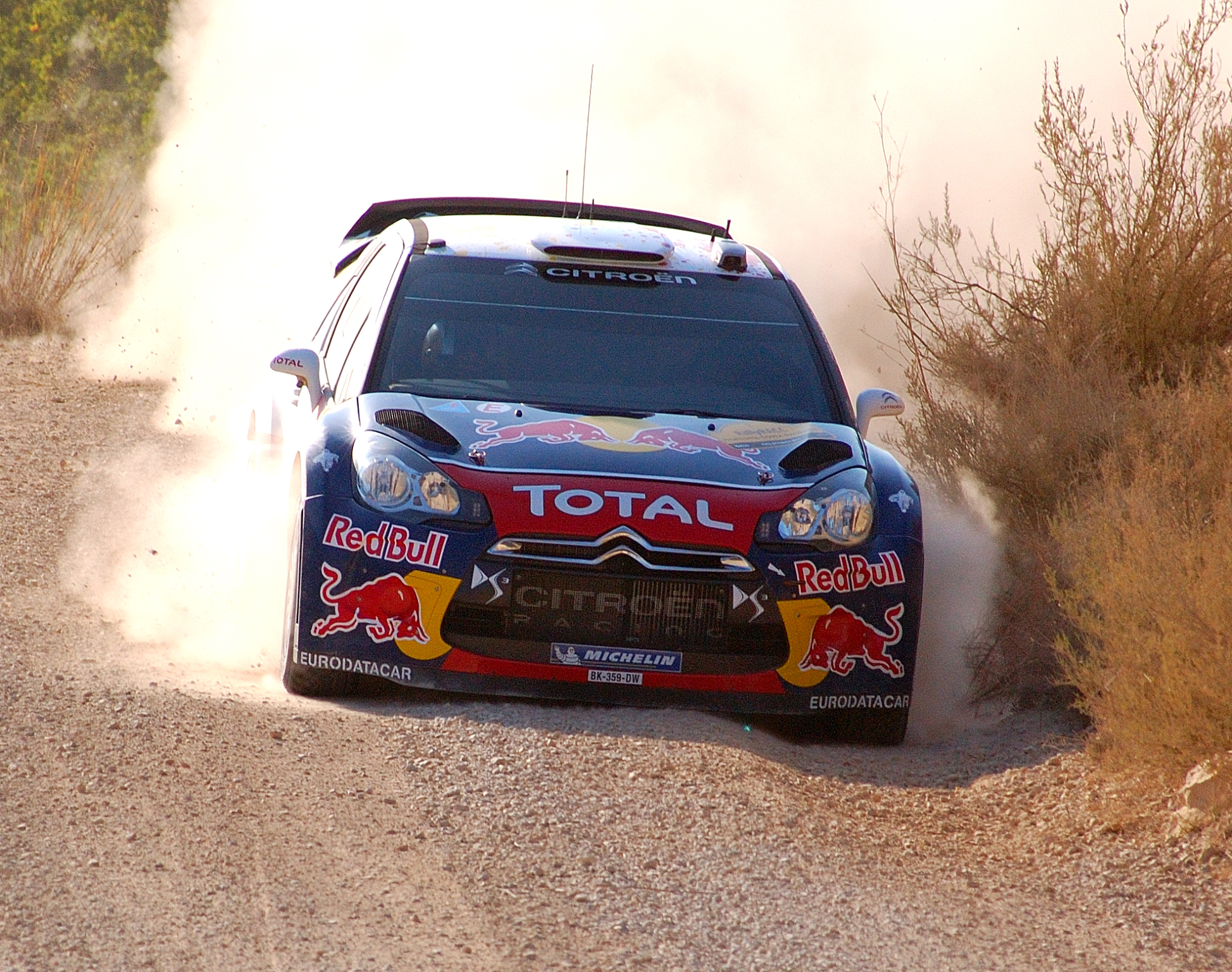 Ogier/Ingrassia